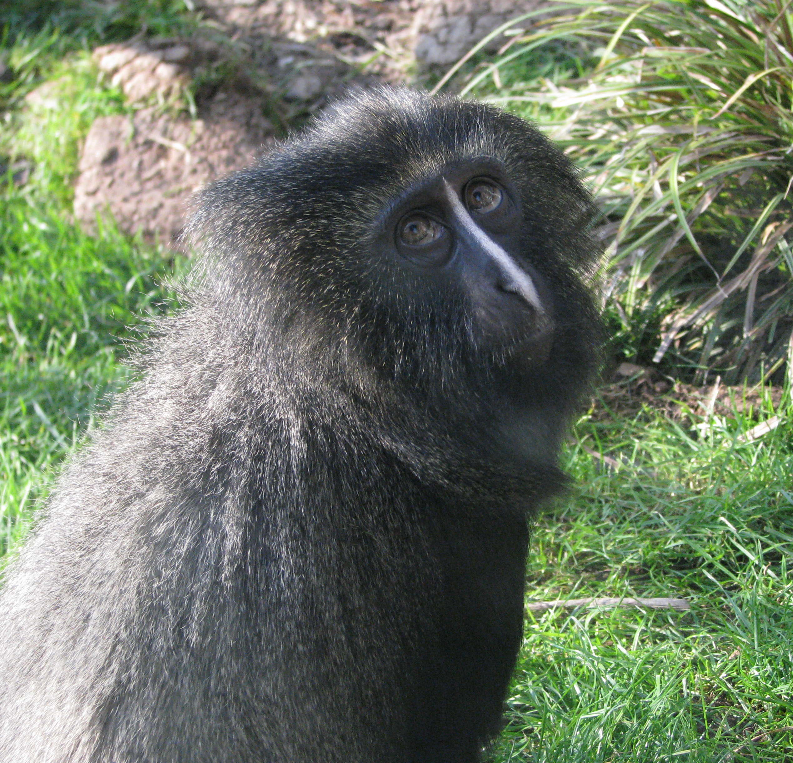 Une femelle cercopithèque à tête de hibou (Cercopithecus hamlyni).